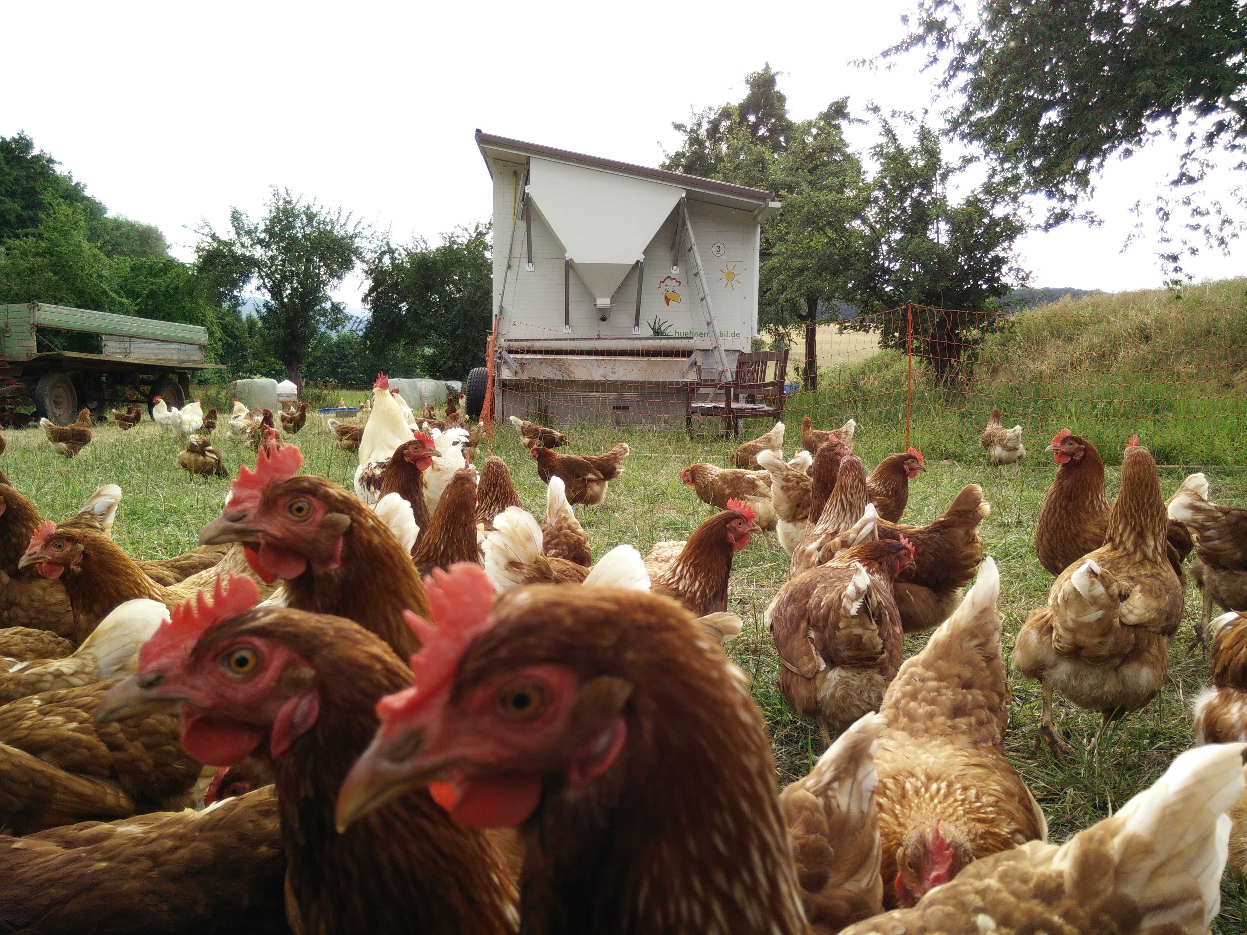 Hühner die immer Grüne Flachen und viel Platz zum bewegen haben. Im Hintergrund ein Weiland Stallsystem.